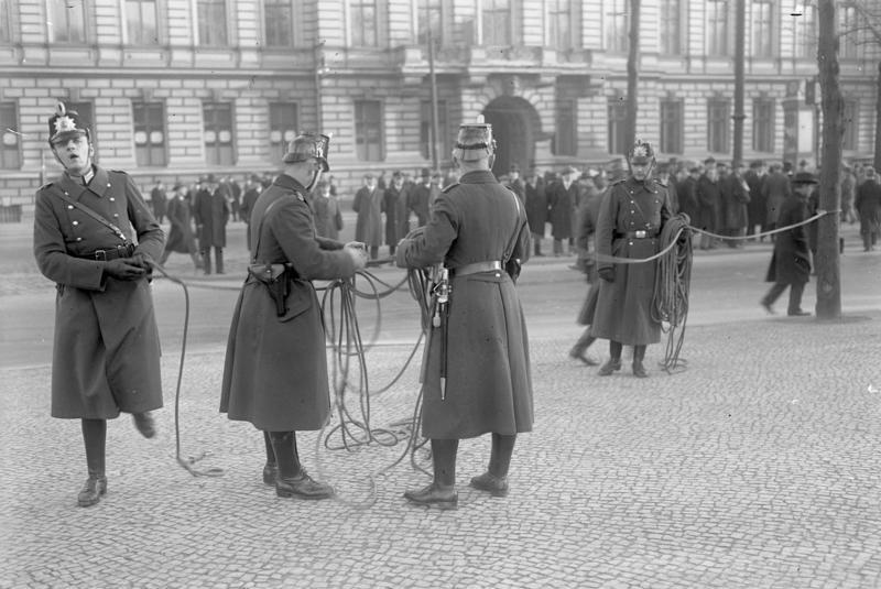 Sicherungsmassnahmen der Polizei zu dem Zusammentritt des Reichstages am 3. Dezember! Um den Vorkommnissen bei der Eröffnung des Reichstages vorzubeugen, hat die Berliner Schutzpolizei umfassende Absperrmassnahmen vorgenommen! Die Berliner Schutzpolizei spannt Seile zur Absperrung des Reichstages.